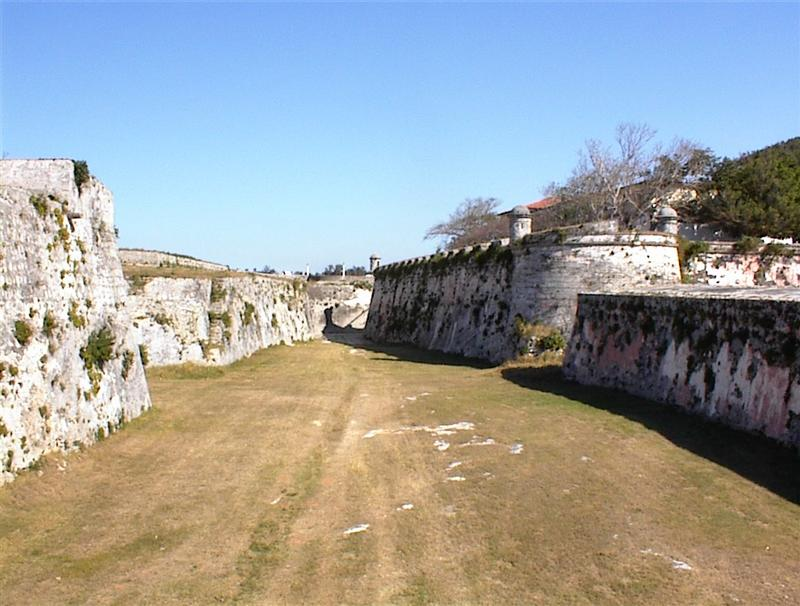 חפיר במבצר לה קבניה.